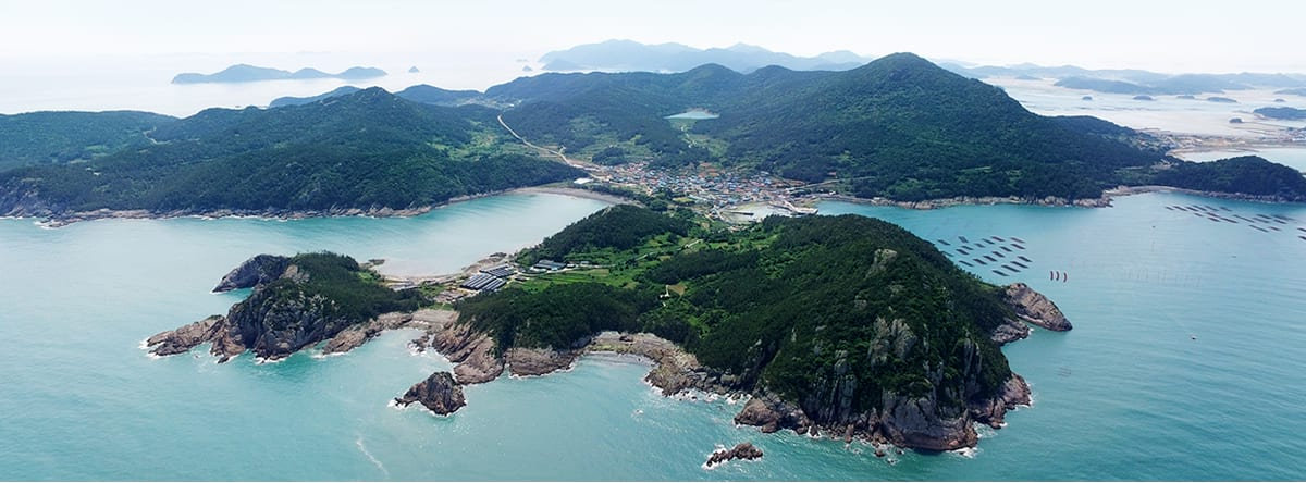 전라남도 완도군의 부속도서인 소안도의 항공촬영한 모습